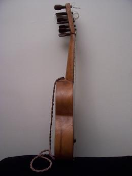 Jarana jarocha (de tamaño "primera"), puede verse la construcción en cedro de una sola pieza. Región de los Tuxtlas, Veracruz, alrededor de 1960.